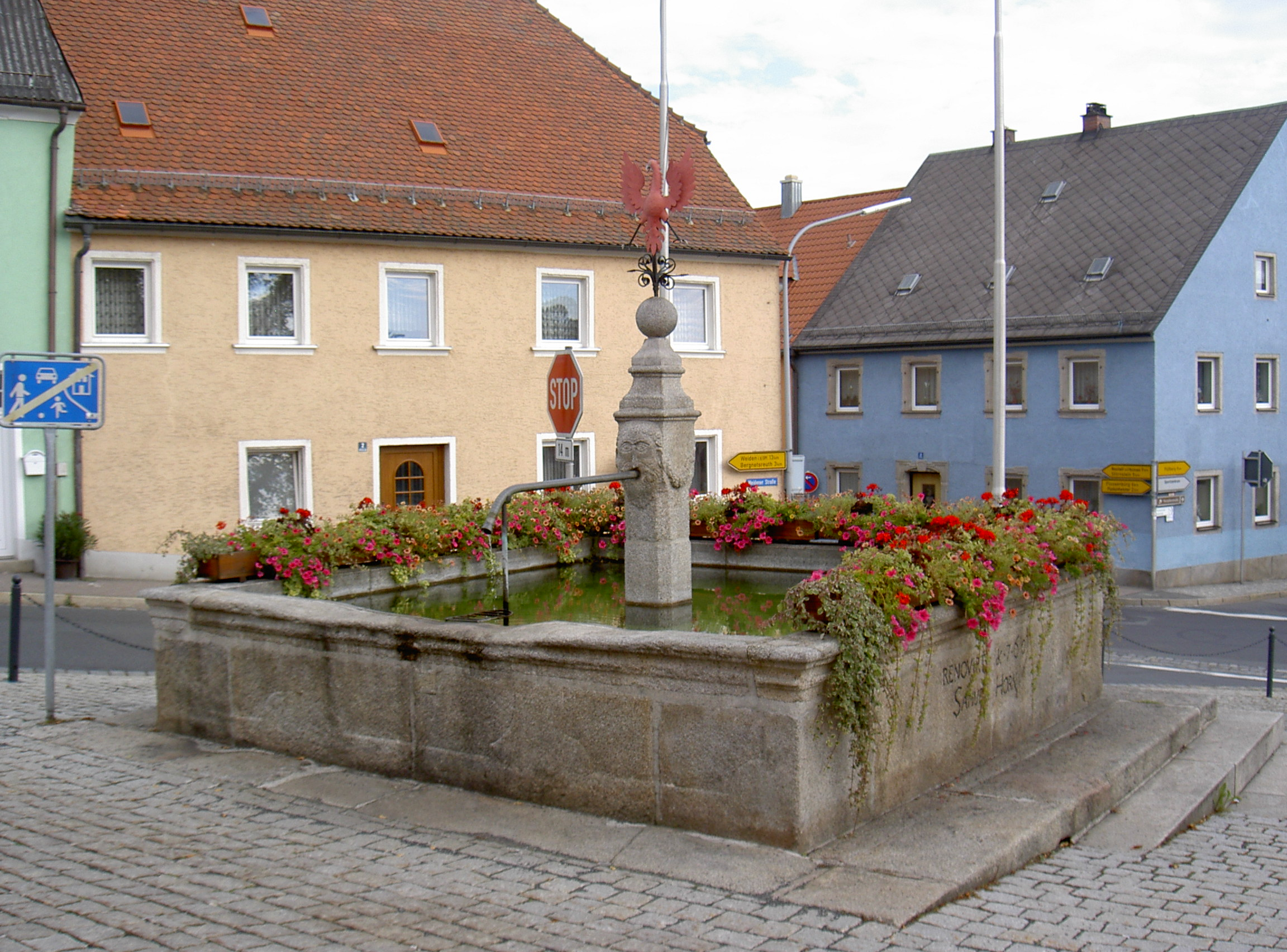 Floß Marktplatz Brunnen